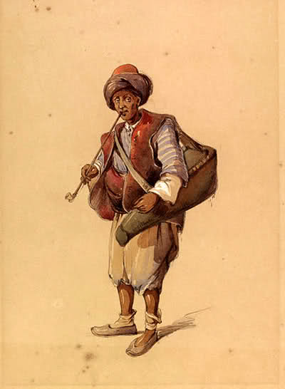 Sakadžija je onaj koji raznosi vodu za piće